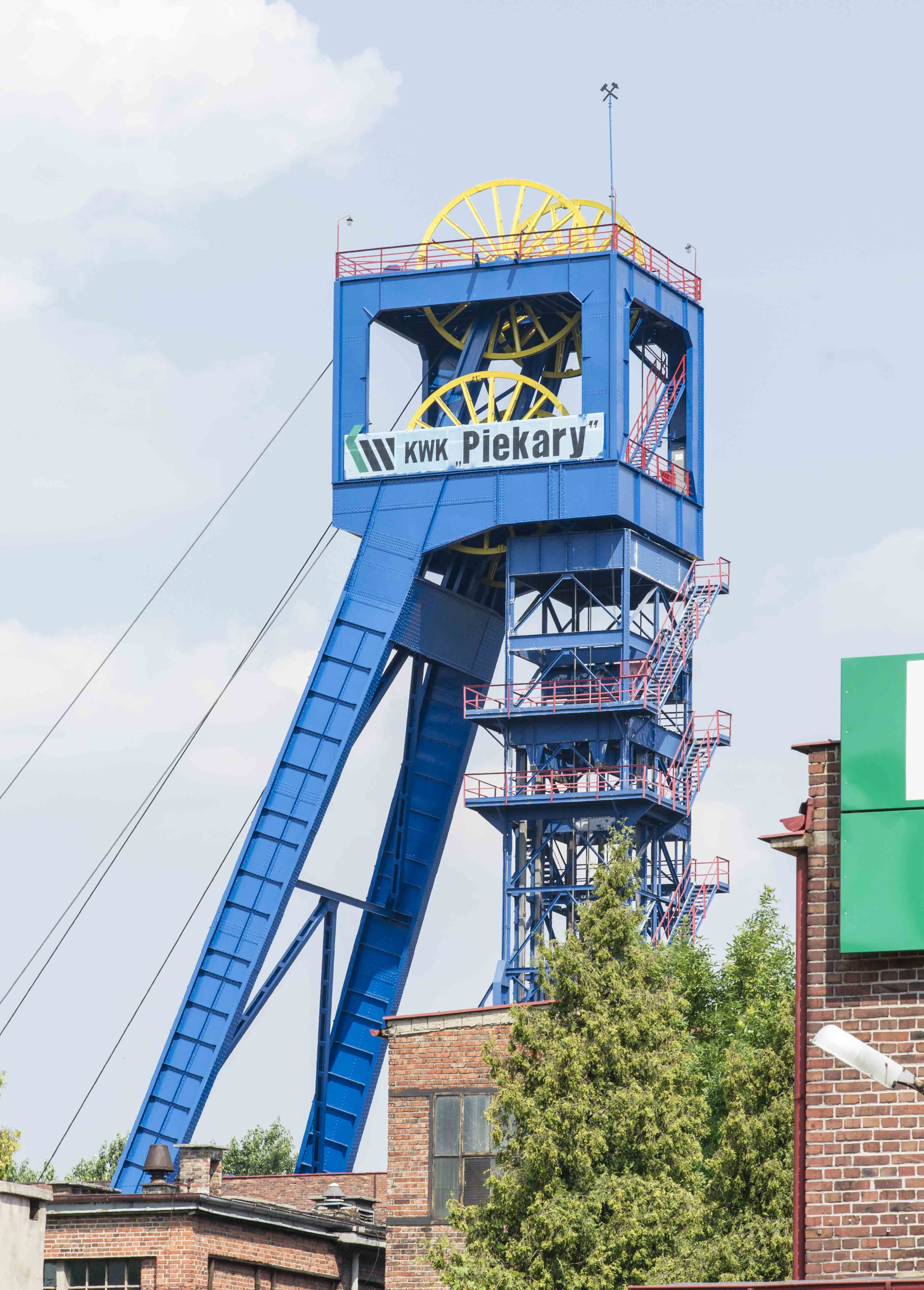 KWK Piekary Szyb I